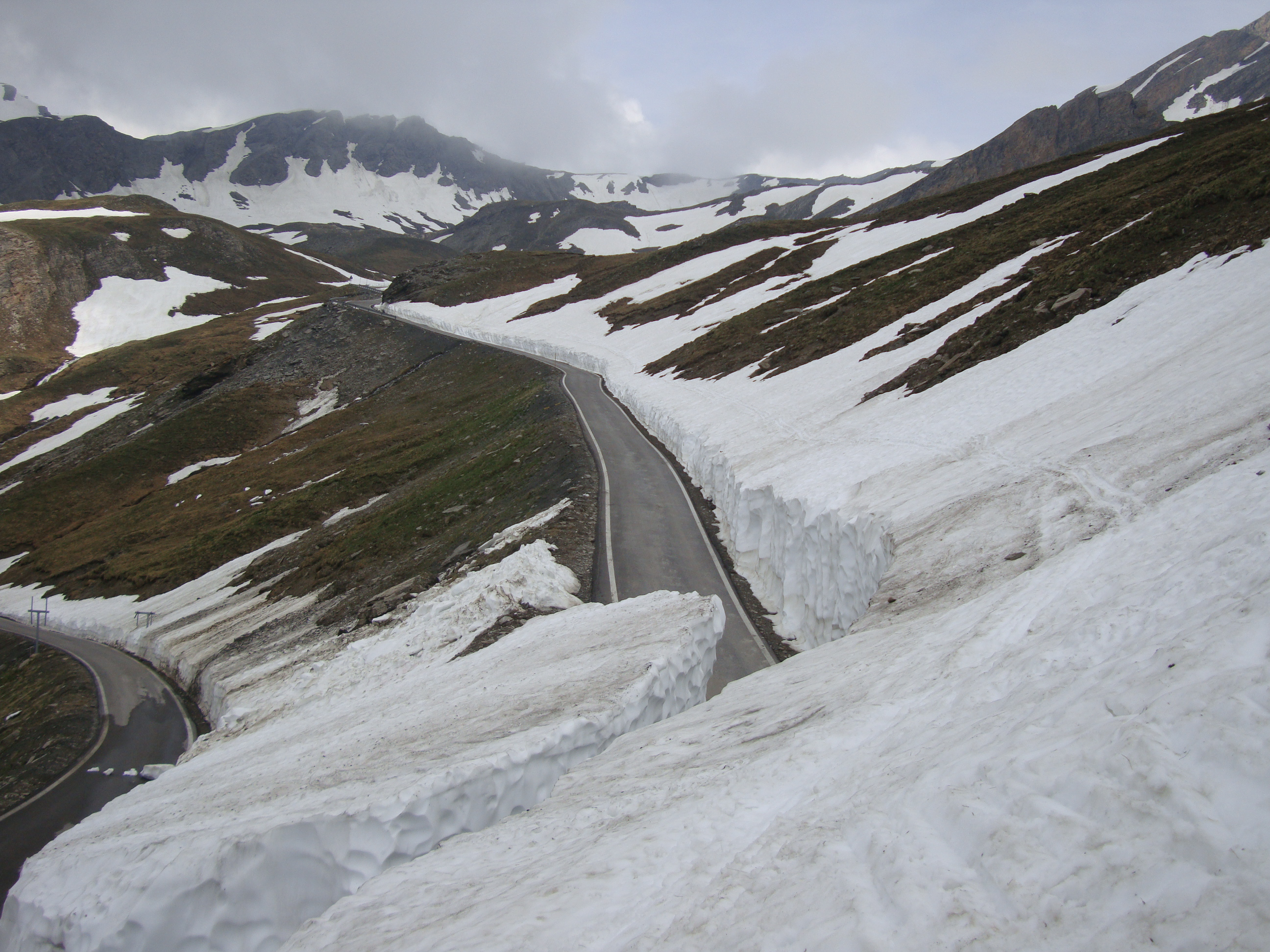 sgombero neve colle agnello prima dell'apertura 2010